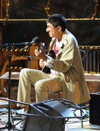 Raimundo Fagner Cândido Lopes mais conhecido apenas como Fagner (Orós, 13 de outubro de 1949) é um cantor, compositor, instrumentista, ator e produtor brasileiro. Apresentação na TV Brasil.